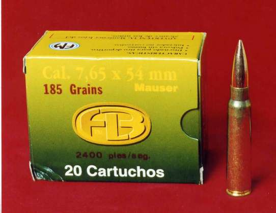 Caja de FM de producción actual de 20 cartuchos calibre 7,65 Mauser